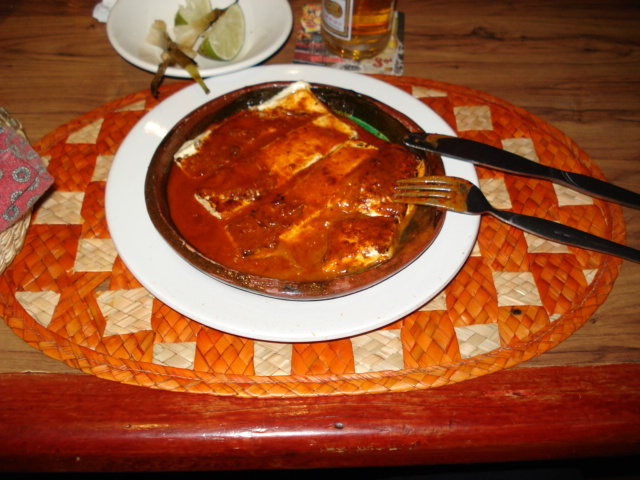 Queso con salsa de Chile Chipotle servida en el Restaurant "La Cantina de los Refugios" en la Ciudad de Mexico